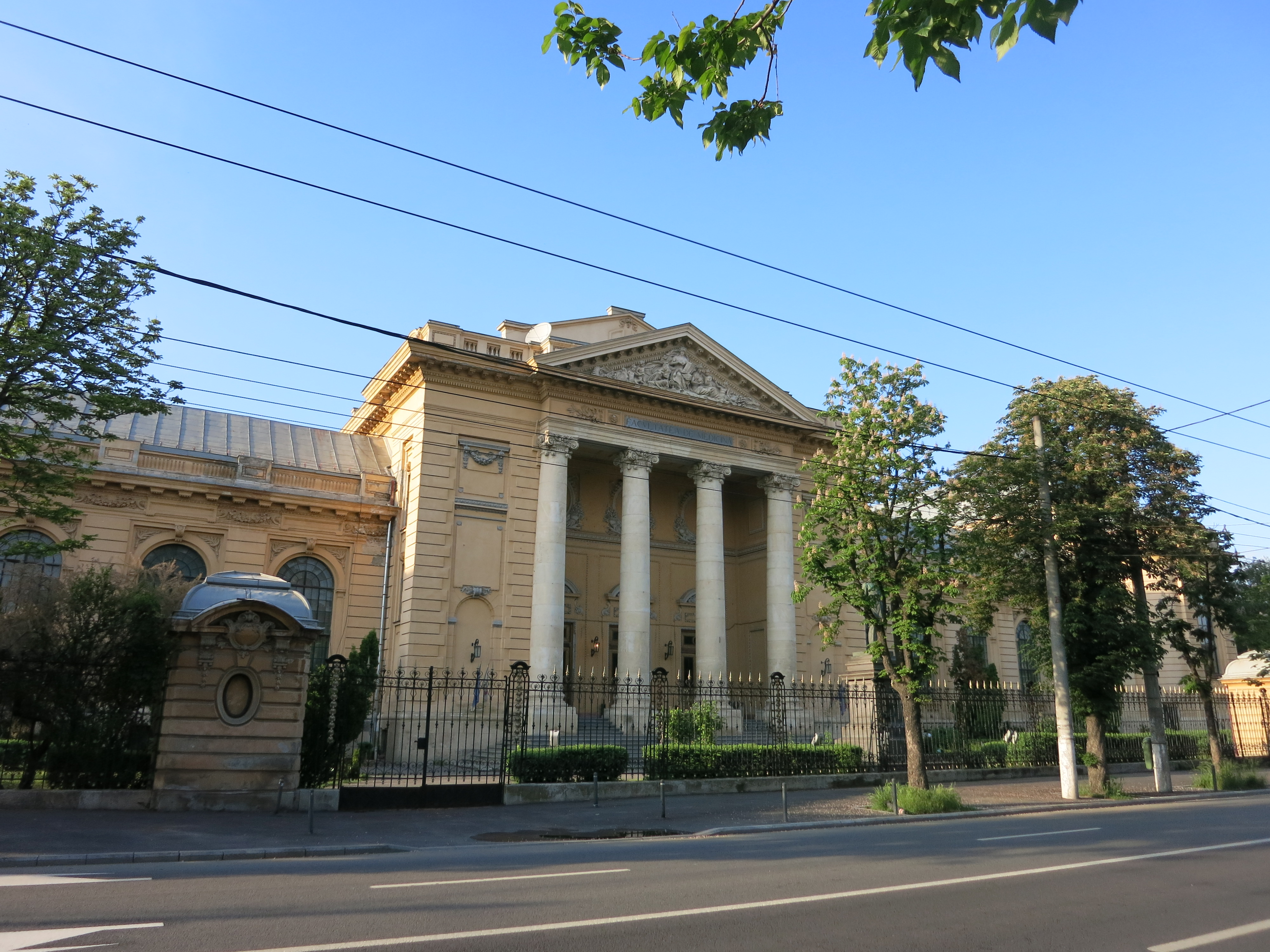 Fosta Facultate de Medicină, azi Universitatea de Medicină și Farmacie municipiul București Bd. Eroii Sanitari 8 sector 5 1900-1903 Louis Pierre Blanc (arhitect) 05